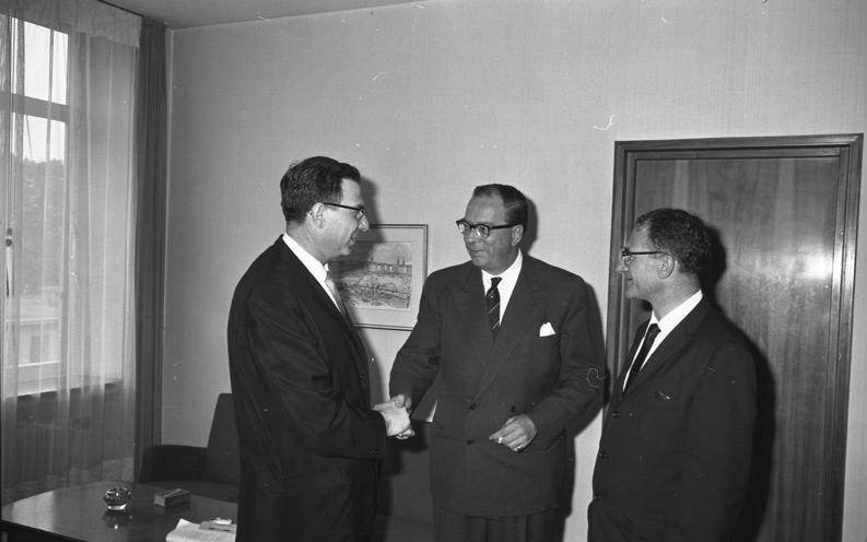 Empfang von 2 Rabbinern aus New York bei Min. Dir. Duckwitz im Auswärtigen Amt, Bonn